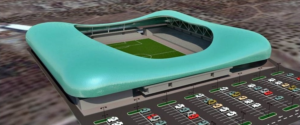 Bodek Architects Kfar Qassem Football Stadium